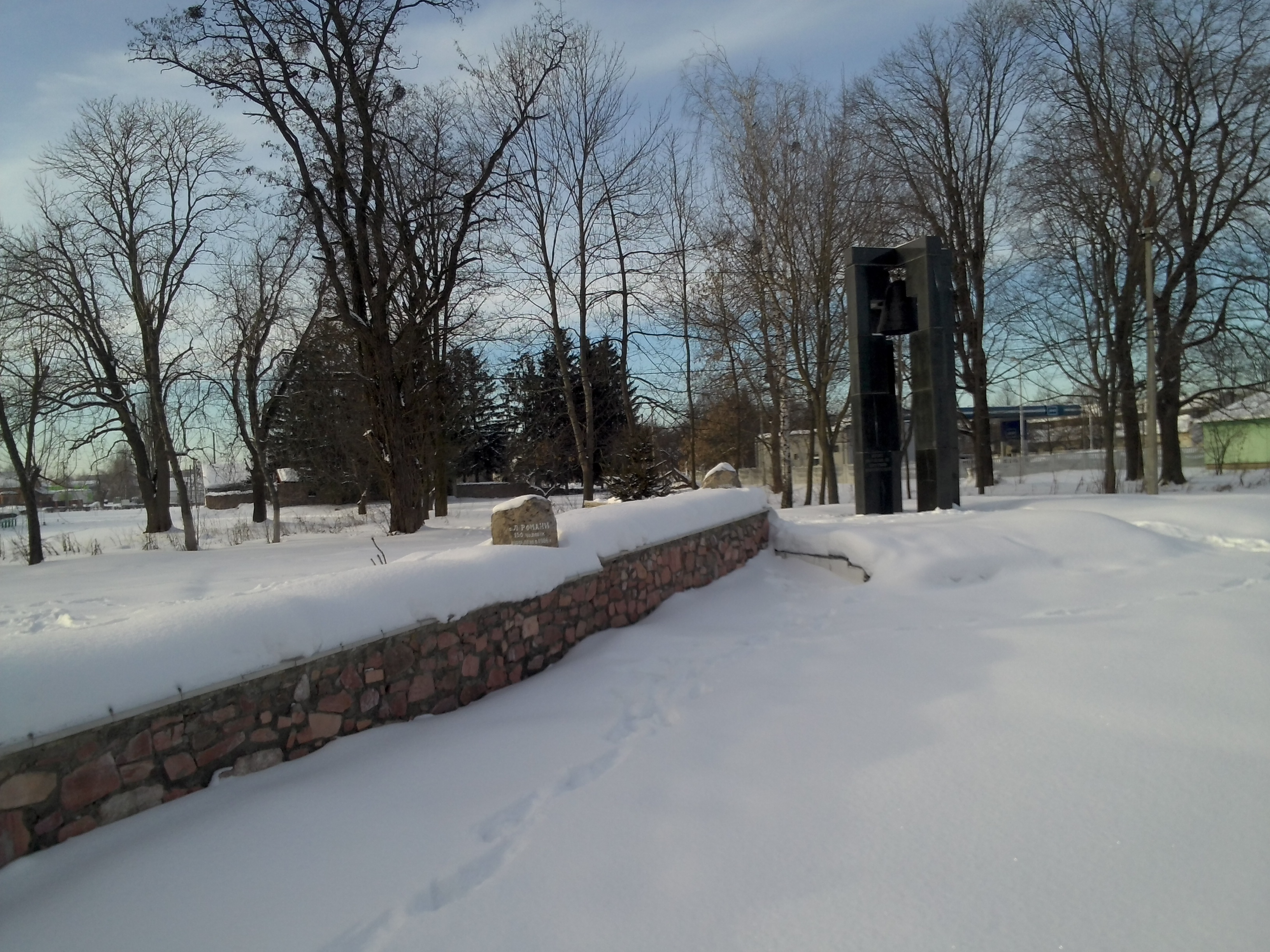 м. Овруч